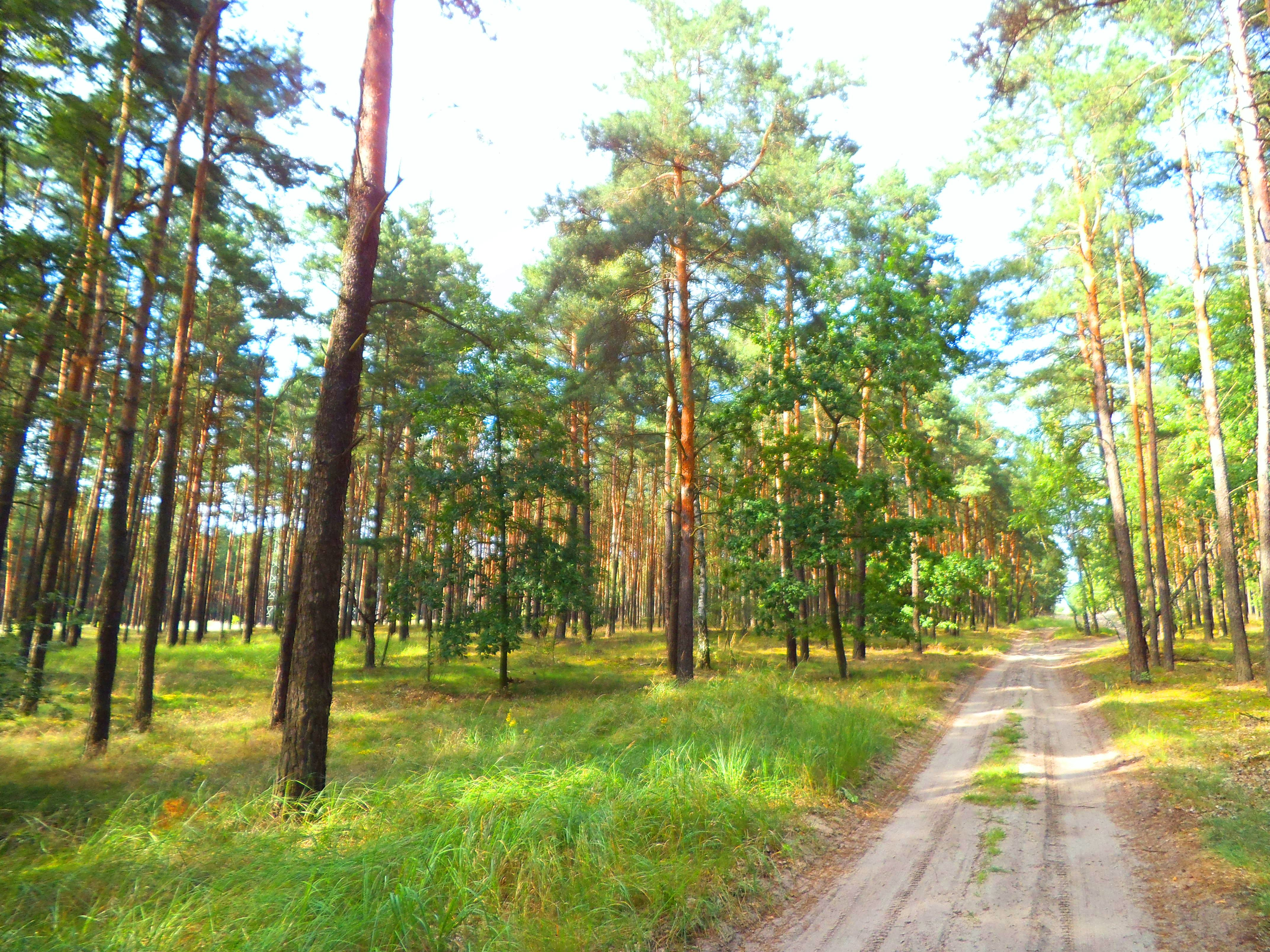 Las Papowski w Toruniu